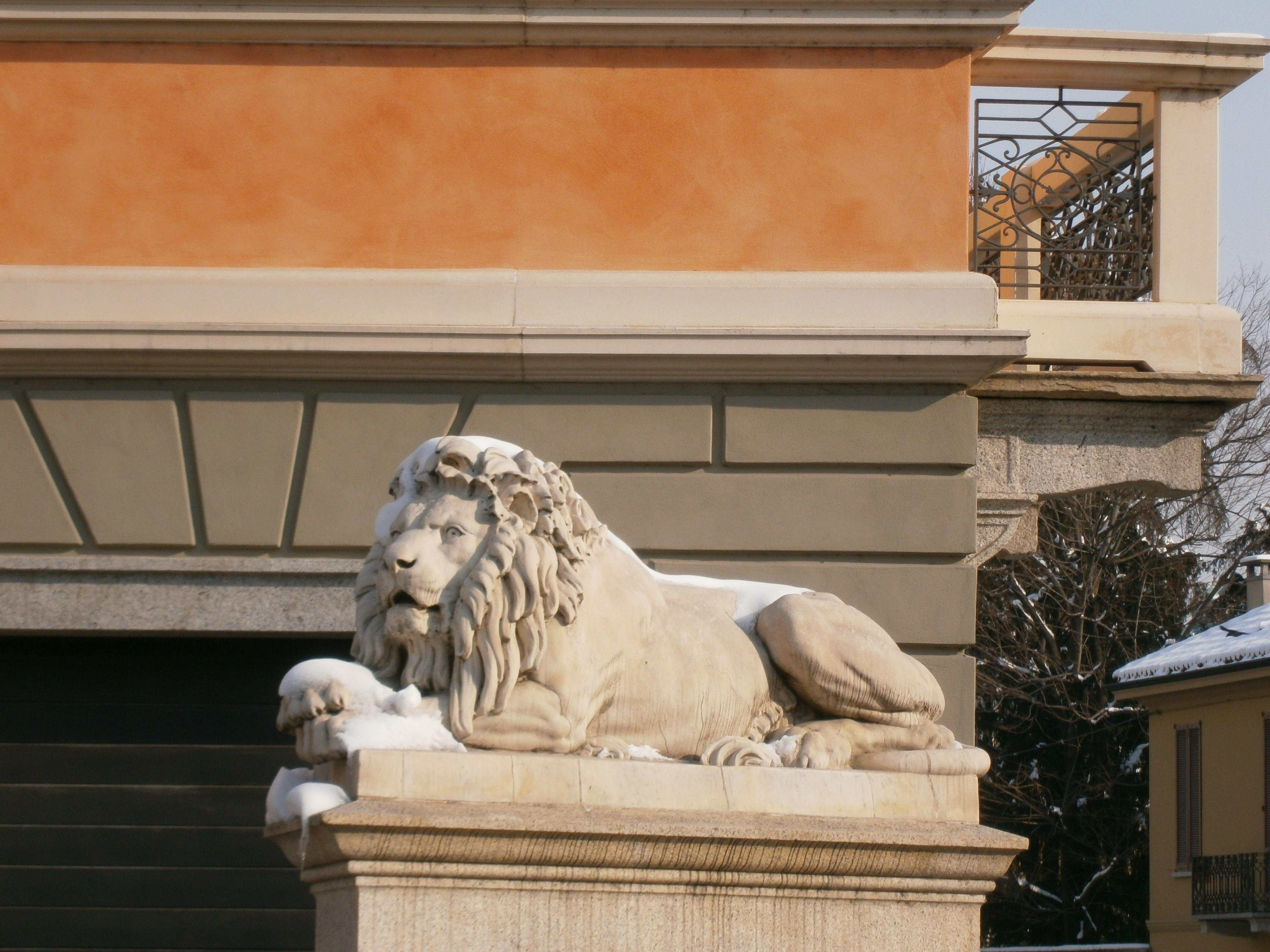 Scultura rappresentante un leone coricato, particolare del ponte.